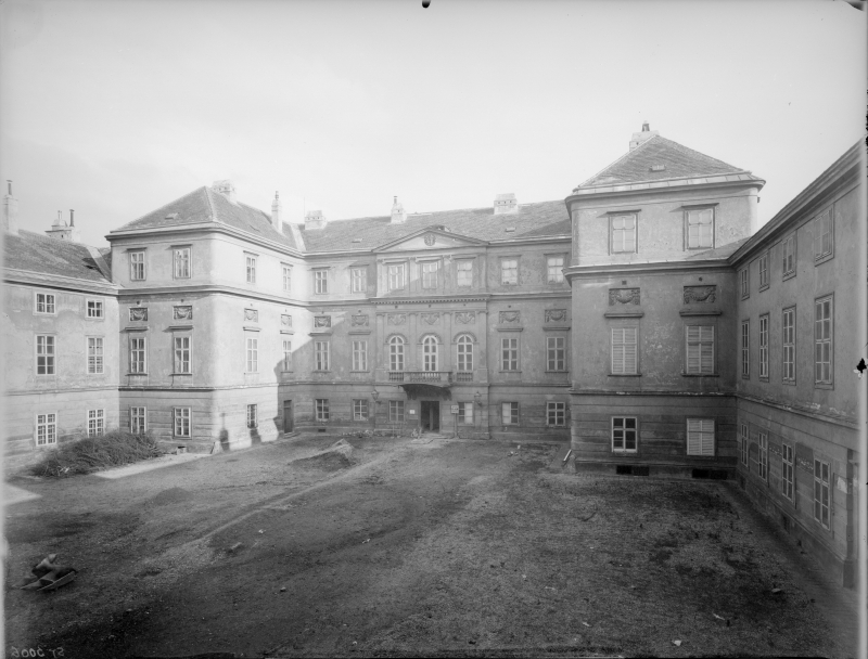 Hoffront. Gesamtaufnahme diagonal.